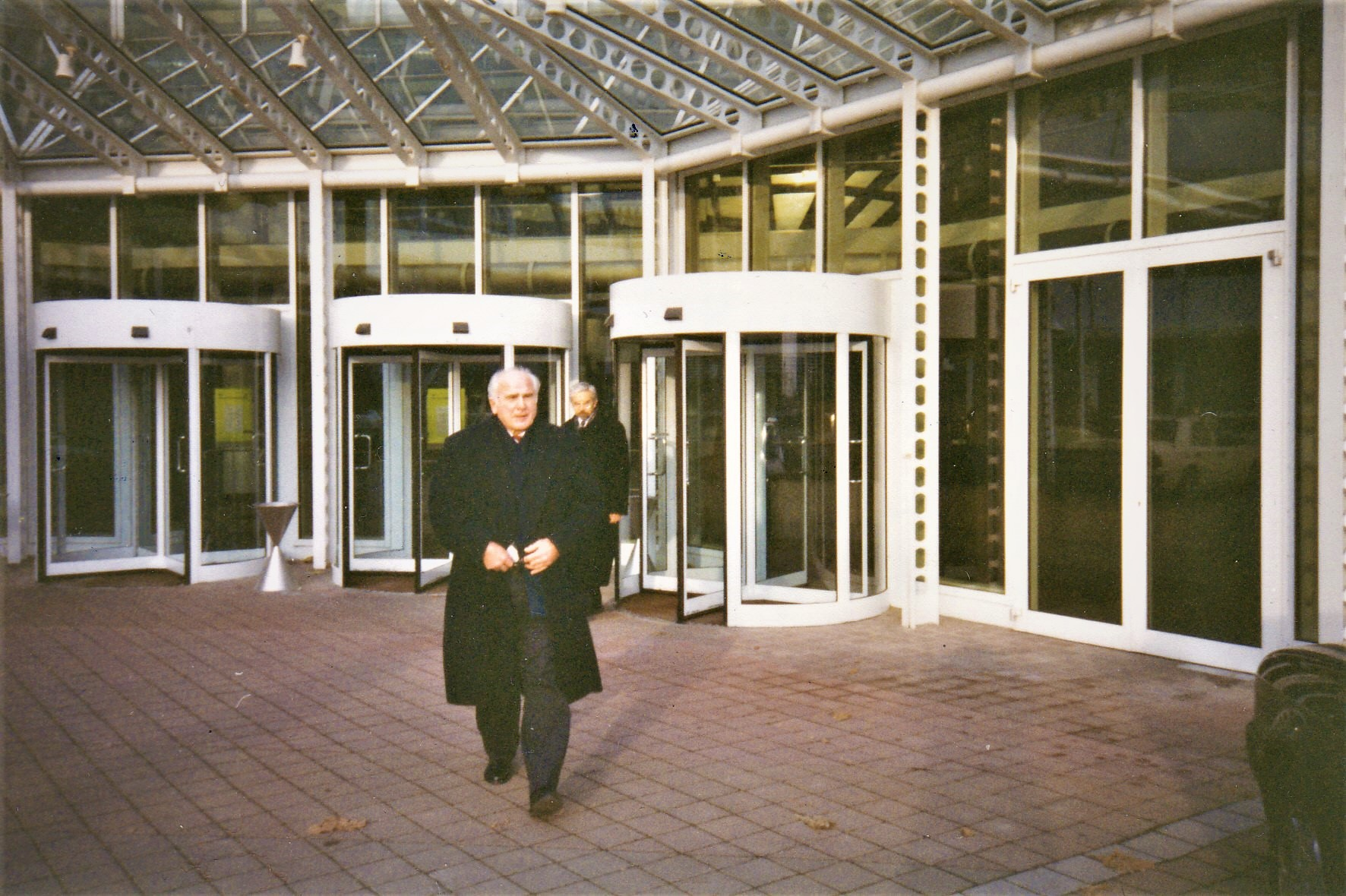 Hofmann, Ulrich, vor dem Lurgi-Haus in Frankfurt a. M. (1997)